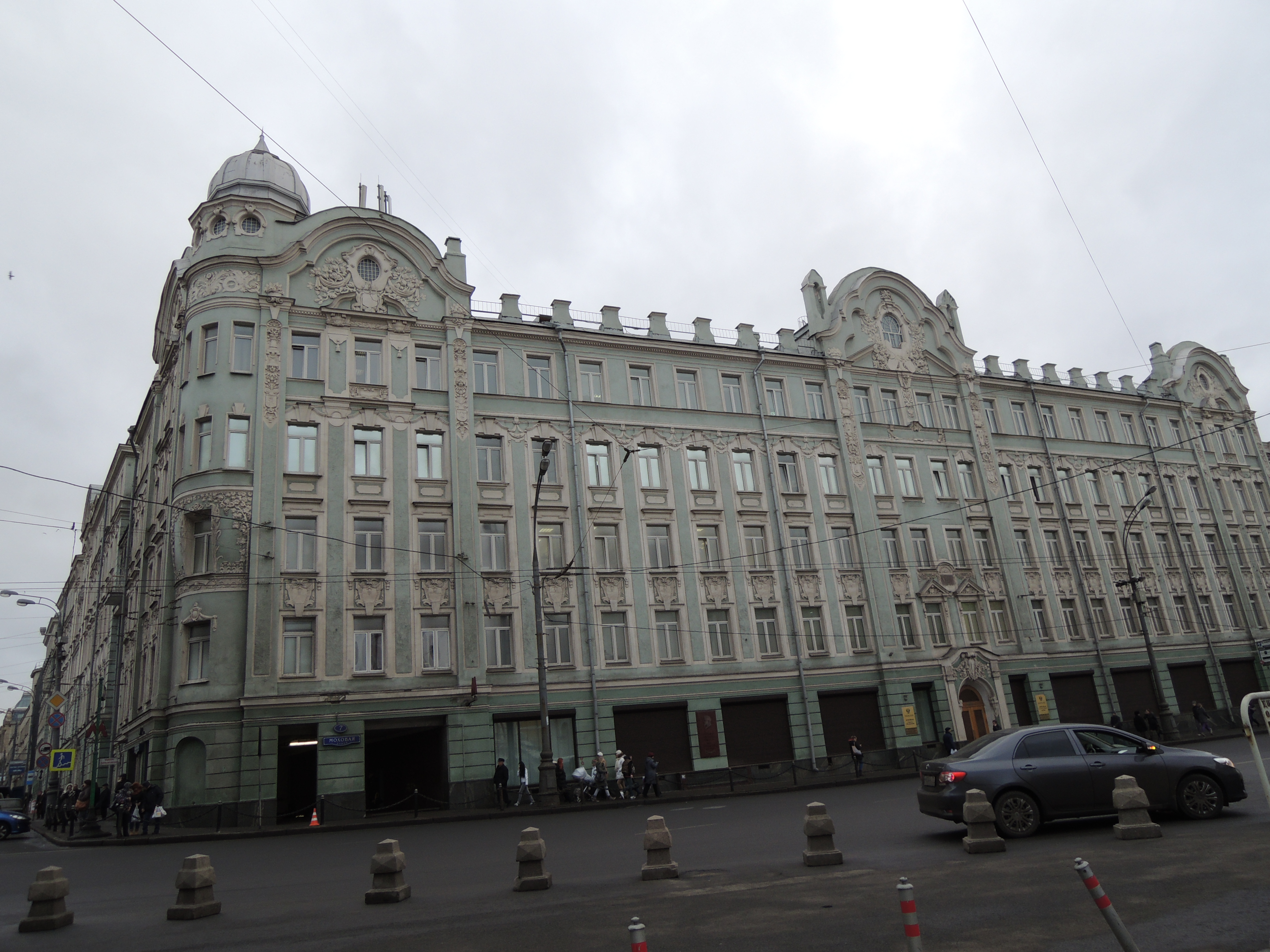 Моховая улица